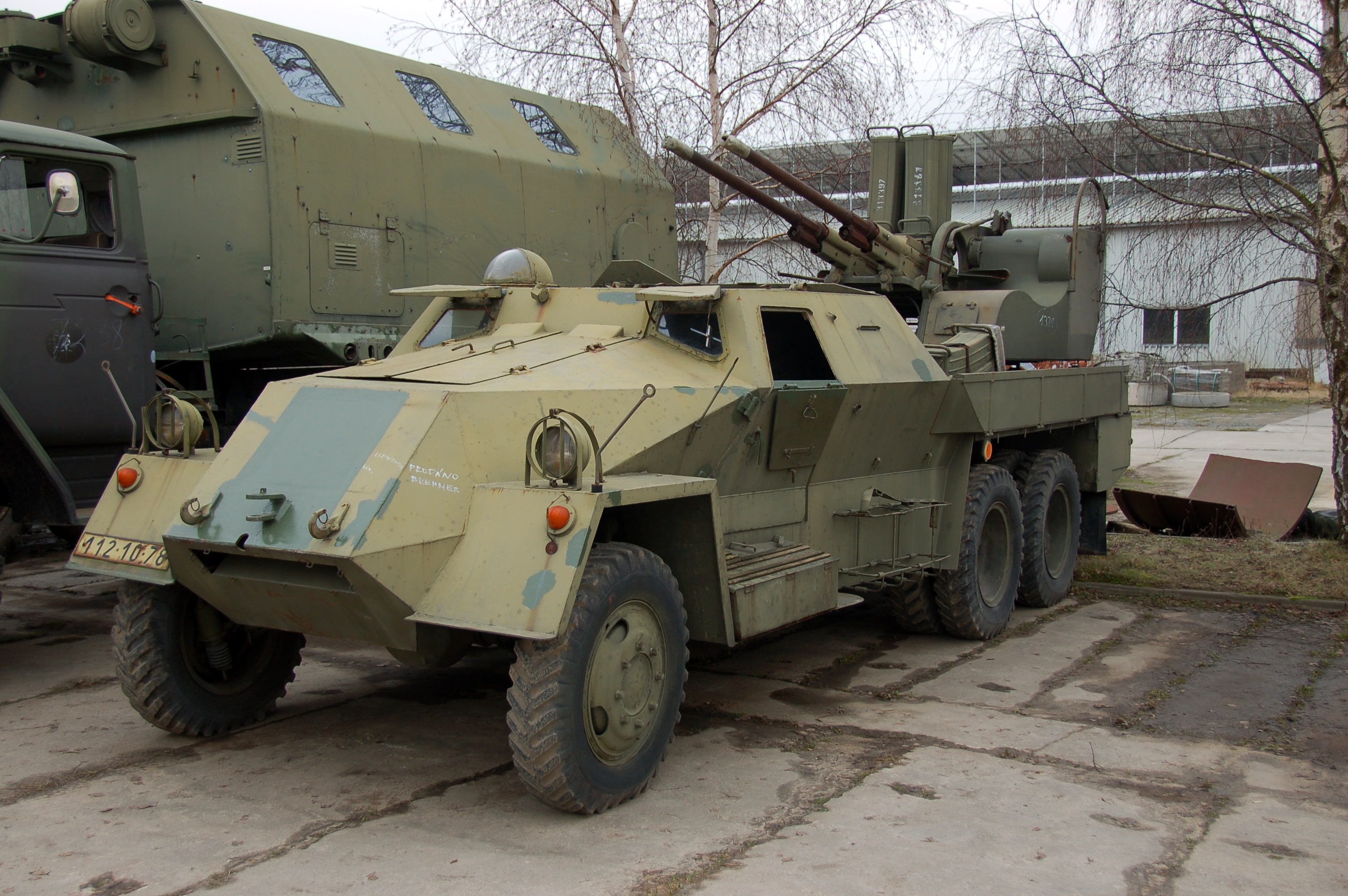 Technikpark MV in Grimmen